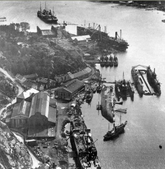 Framnæs mek Værksted. Året var 1929. Skipet som ligger kantret i bildet er hvalkokeriet Pythia. Arbeidere hadde fjernet plater i siden av skipet forut og skipet ble så trimmet feil slik at vann fosset inn. Skipet la seg over på siden over hvalbåten Thordr. Begge ble reparert og Pythia ble solgt til Hvalfanger A/S Afrika og døpt om til Ready.